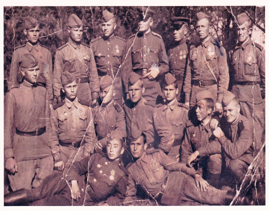 17-ая гвардейская воздушно-десантная бригада, Ступино-Каширы под Москвой